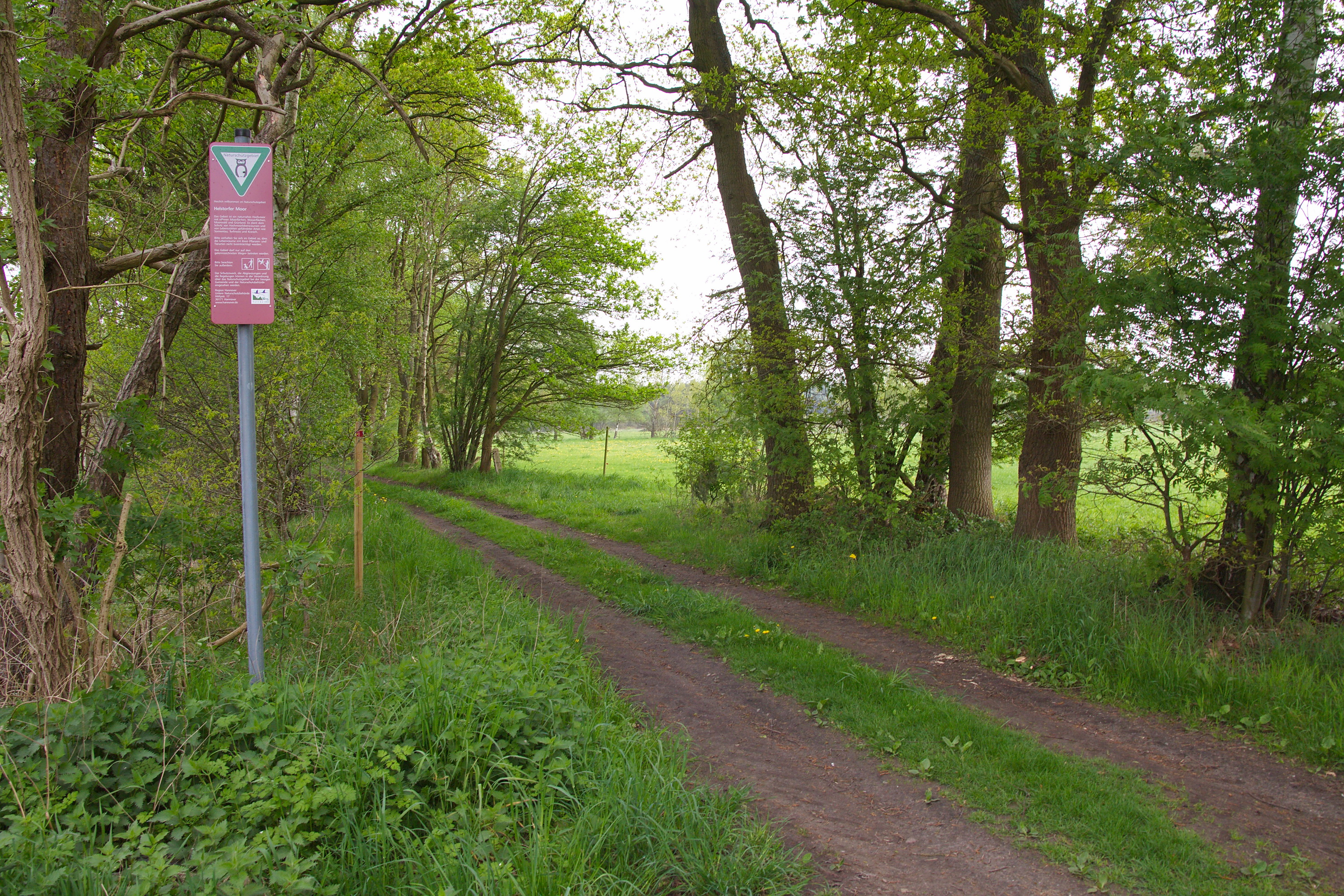 Helstorfer Moor (Wedemark), Niedersachsen, Deutschland.